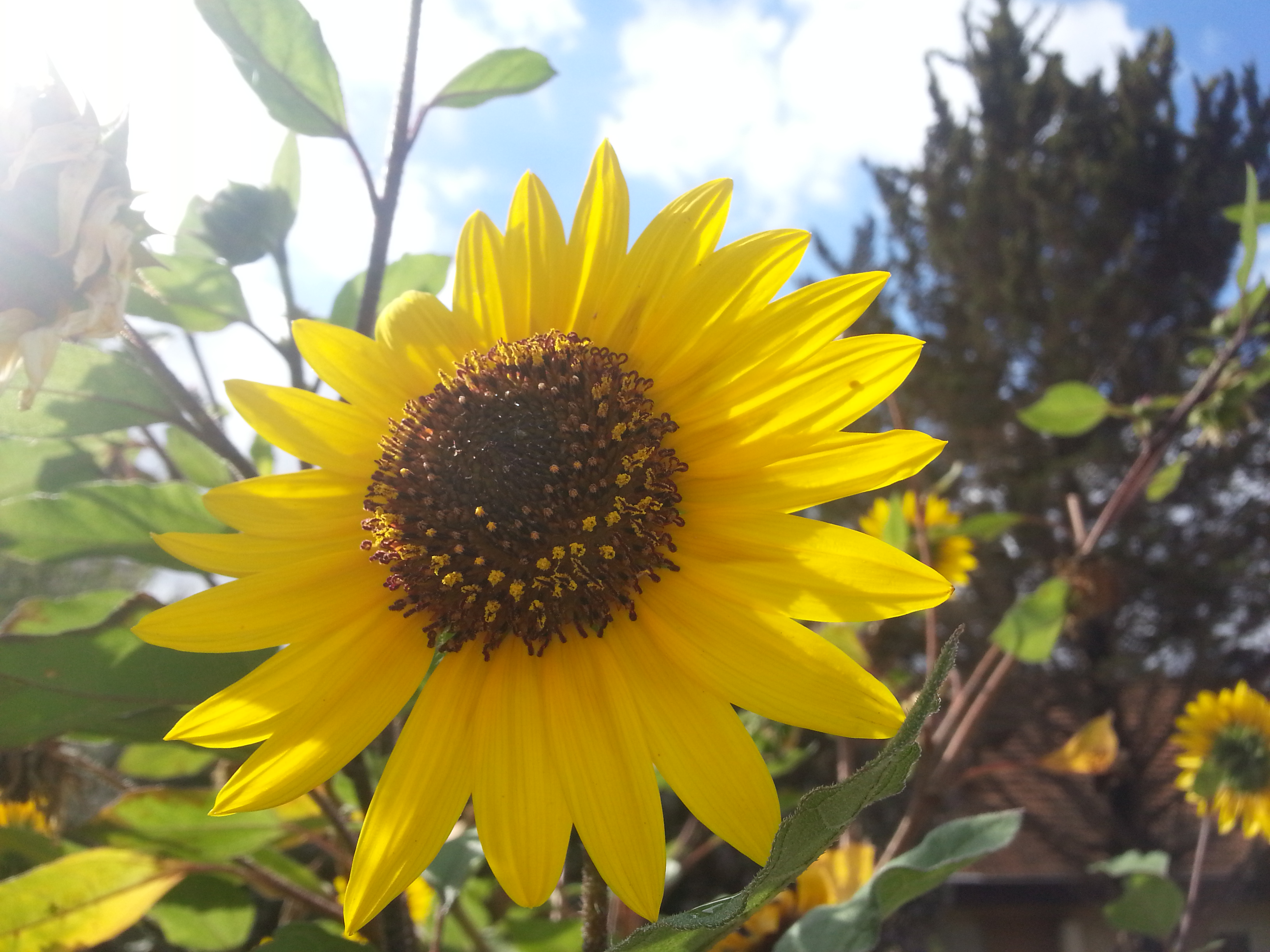 חמניה בנווה צוף